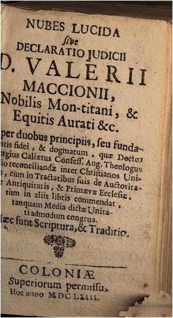 Titelseite des kontroverstheologischen Werks Nubes lucida von Valerio Maccioni, Erstdruck, Köln 1663